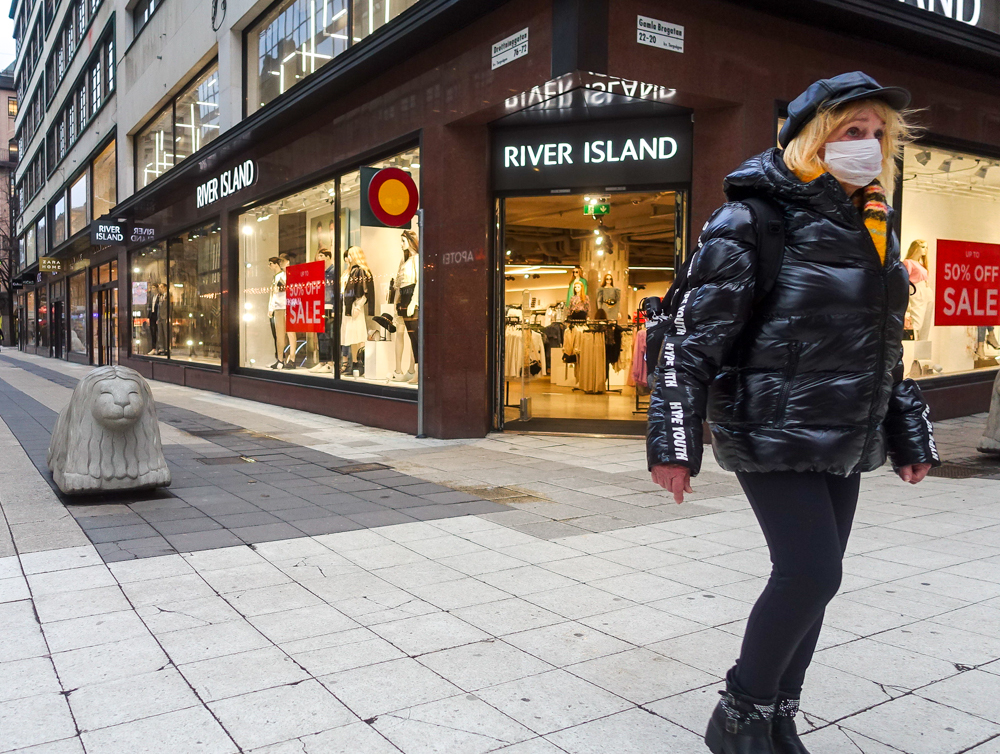 Ett folktomt city i Stockholm under coronapandemin i mars 2020. Normalt fullt med shoppande människor.